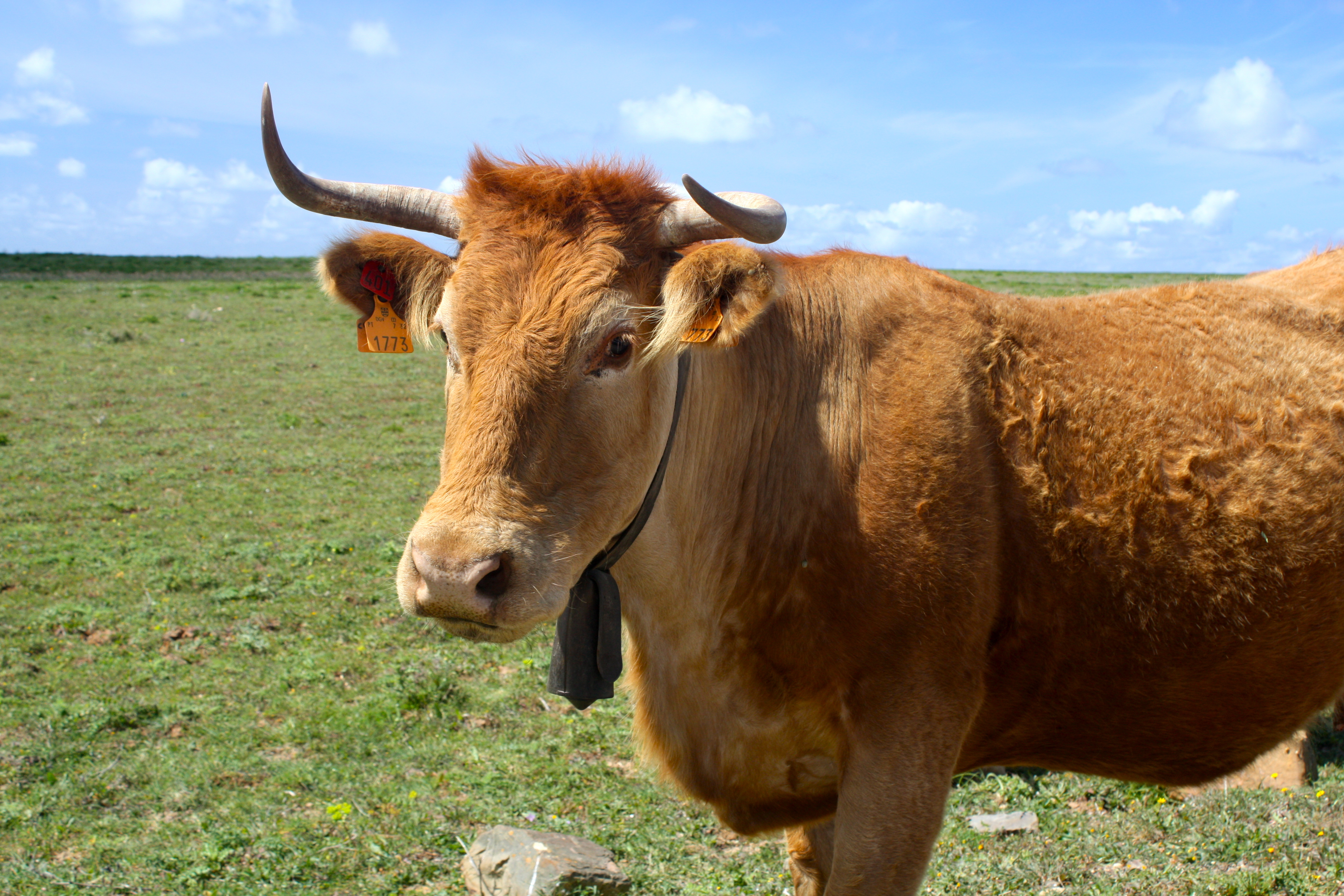 Algarve - 086